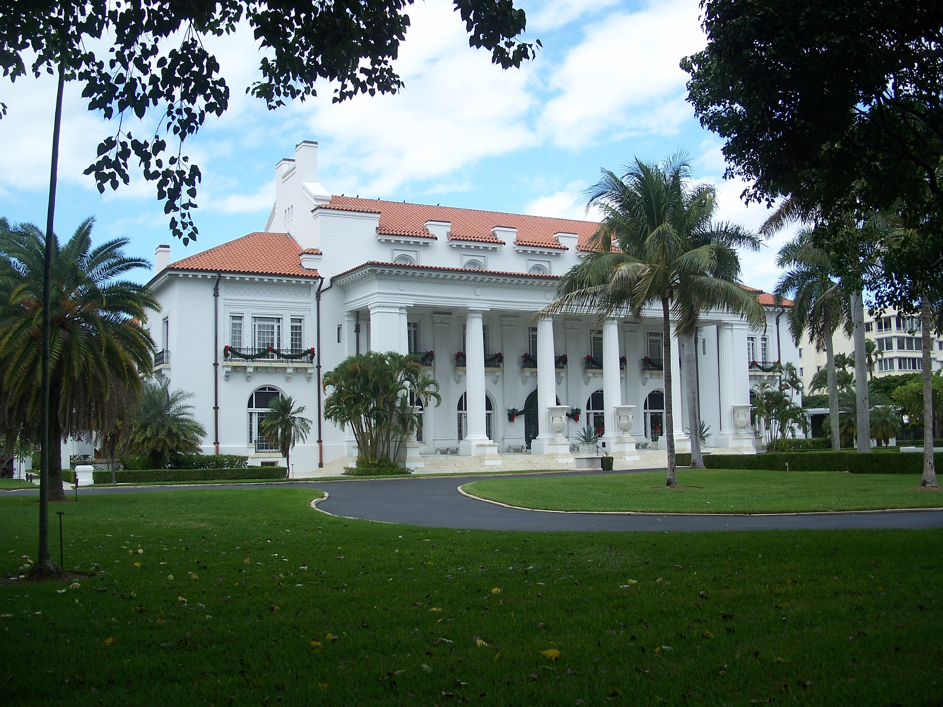 Palm Beach, Florida: Flagler Museum